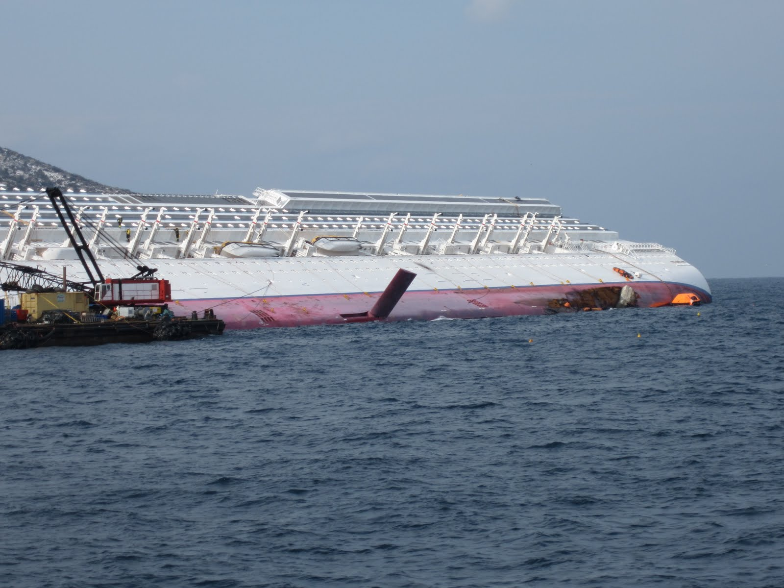 La paleta grande que sobresale en el medio es la placa antirolido, para estabilizar al buque...